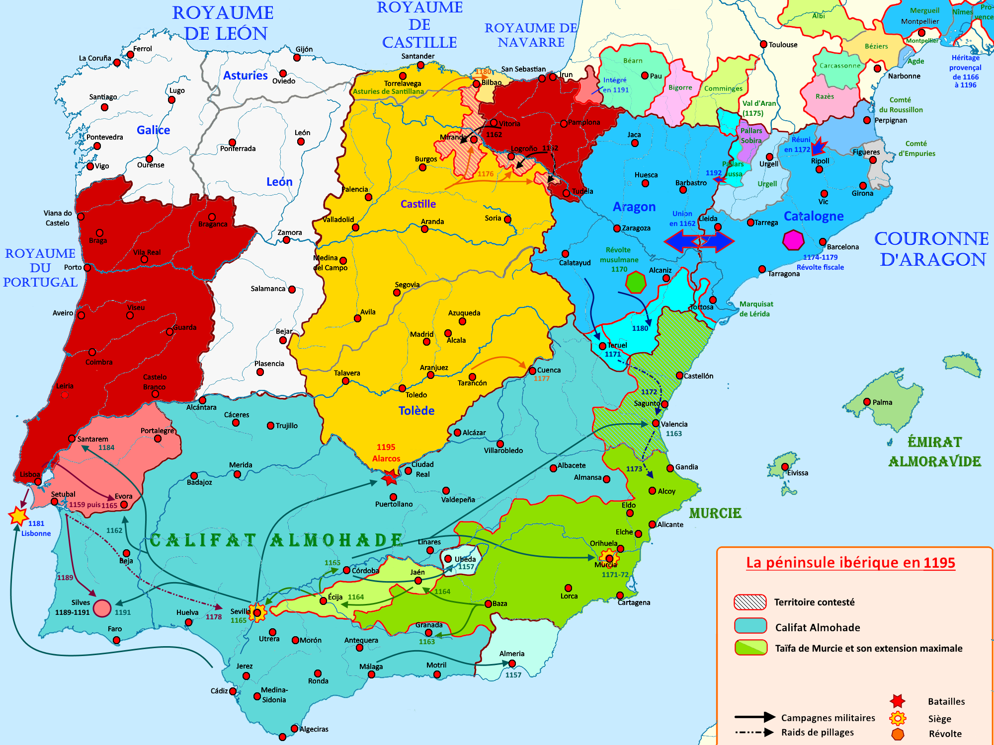 Carte de la péninsule ibérique en 1195 illustrant les principaux évènements de la période